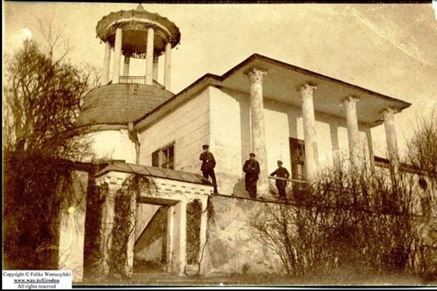 Сядзіба Панямонь